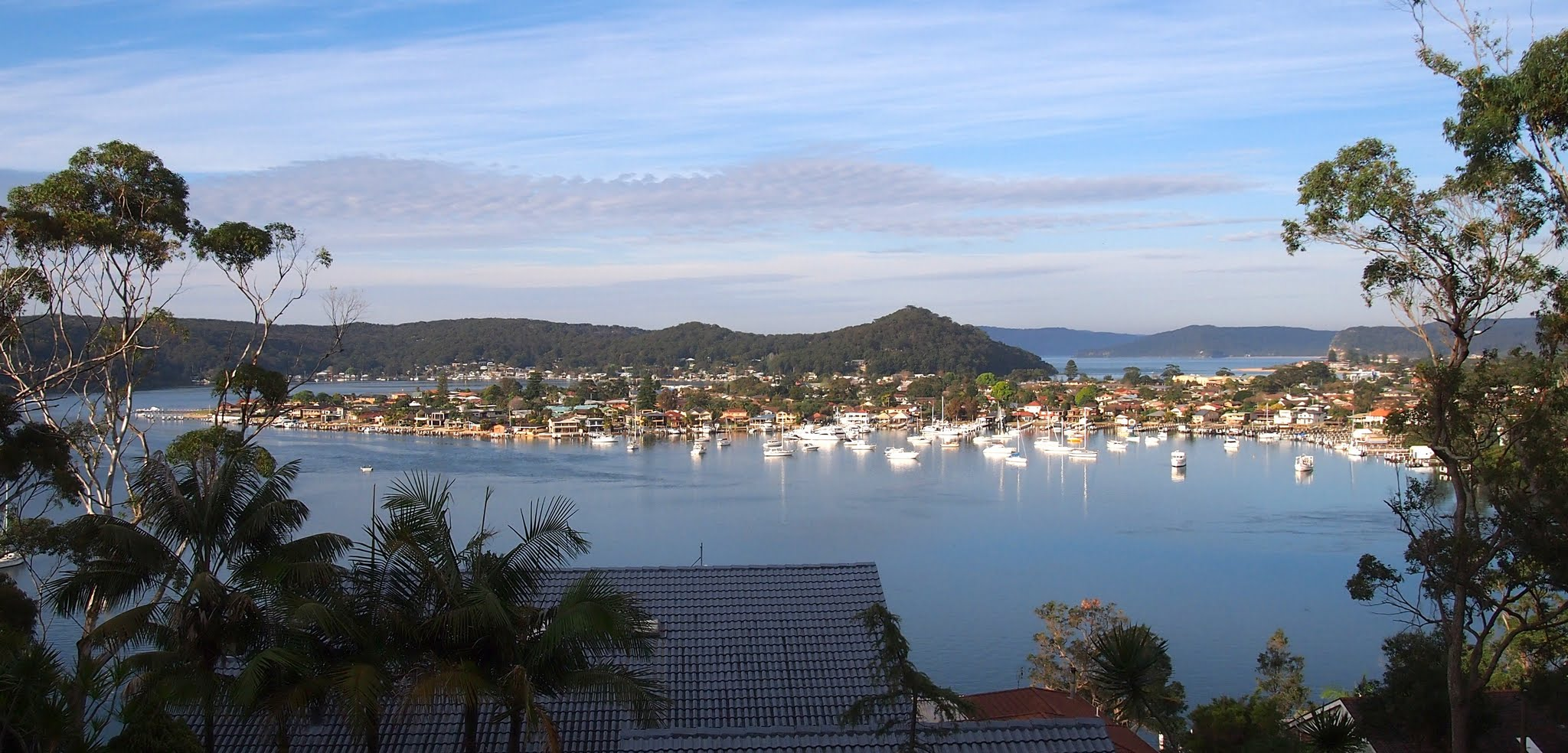 Daleys Point